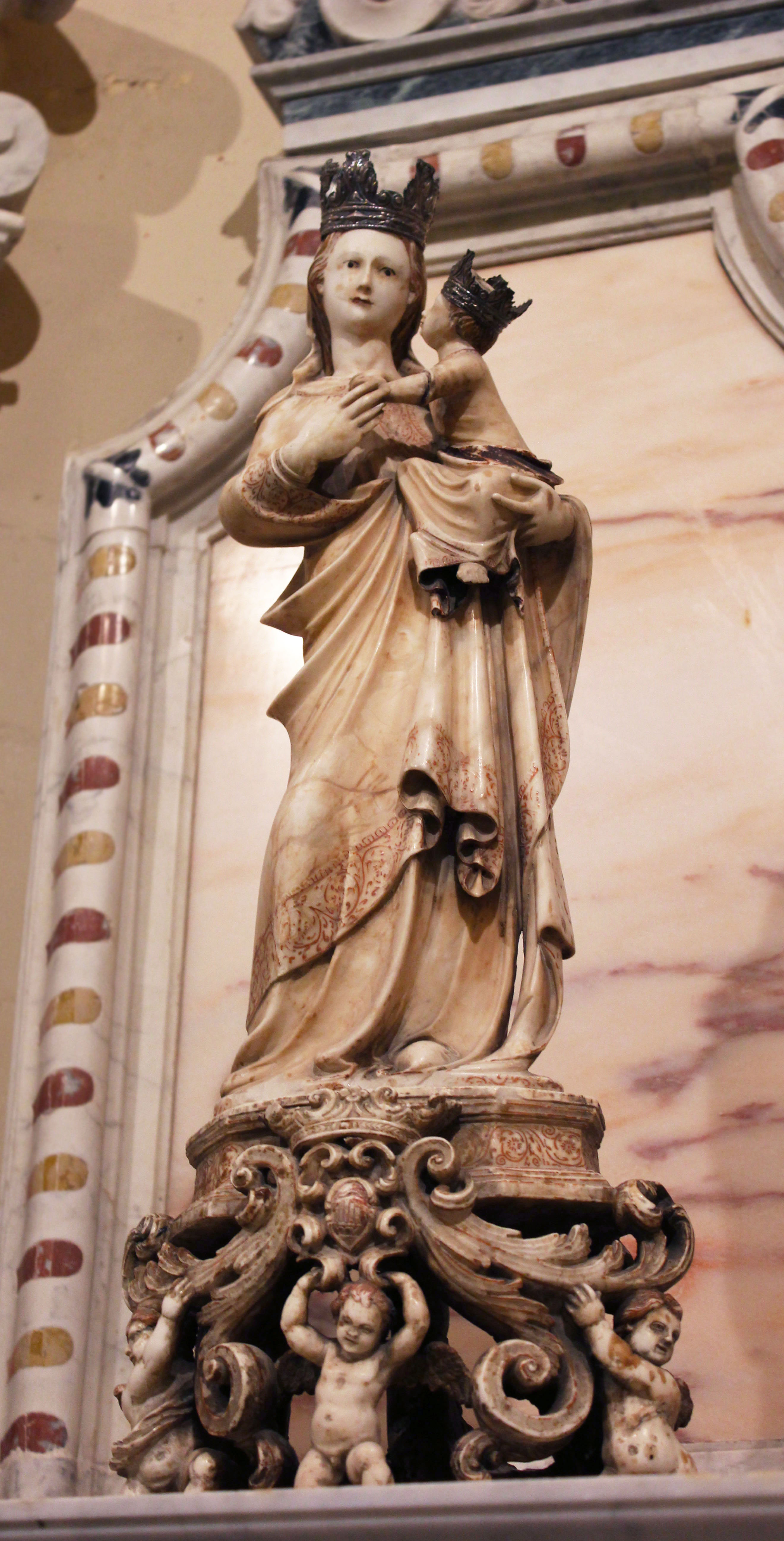 statua della Madonna di Trapani a Santa Lucia del Mela (ME)